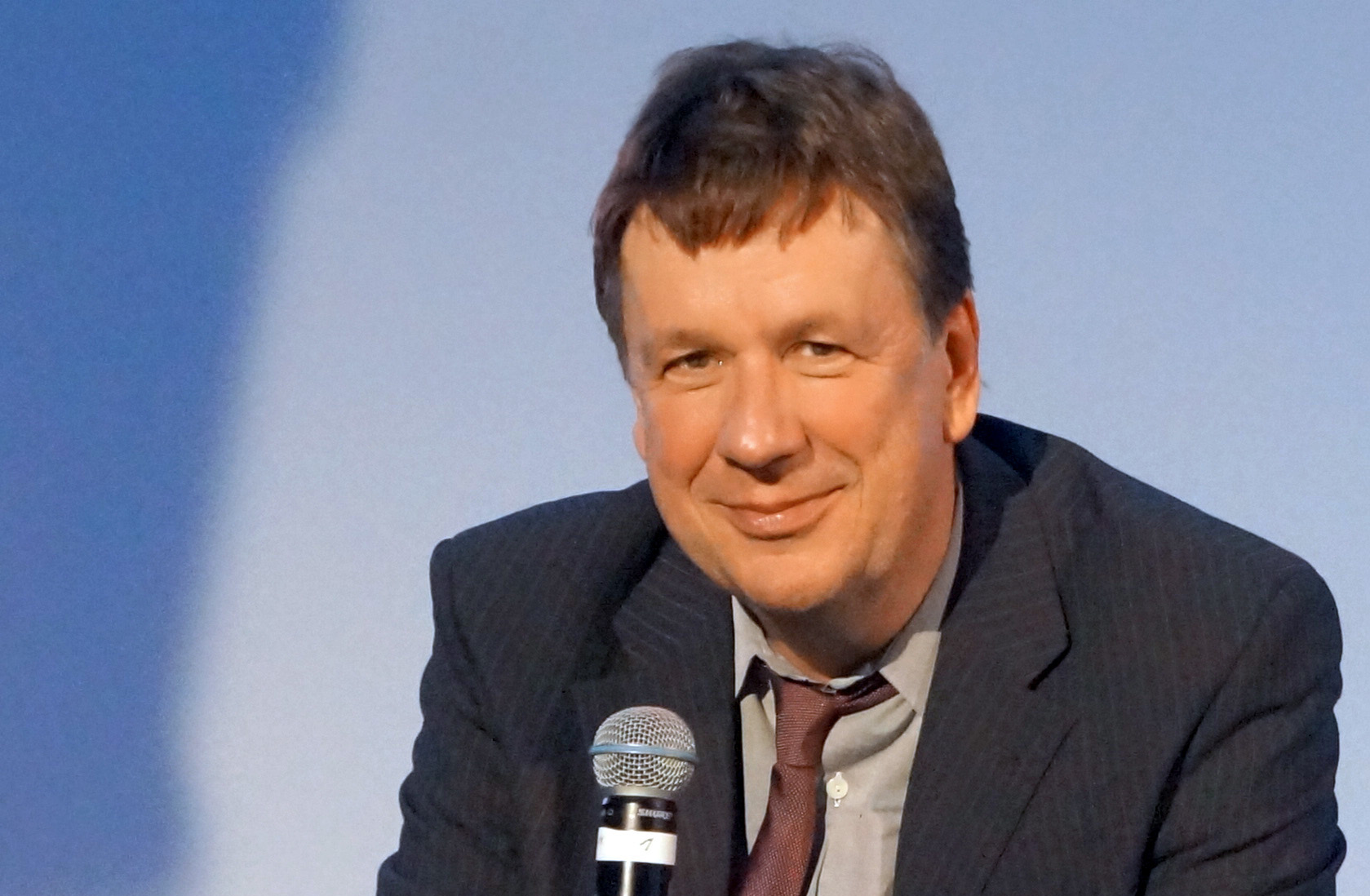 Jörg Kachelmann bei einem Auftritt im April 2016 in Erbach im Odenwald